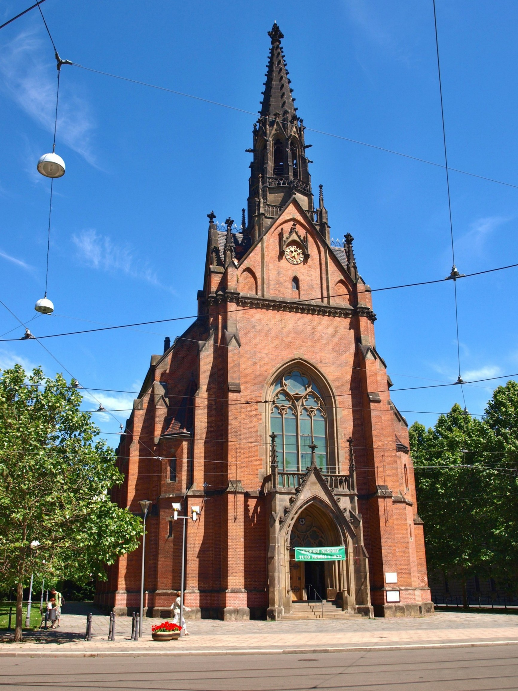 Českobratrský evangelický chrám Jana Amose Komenského